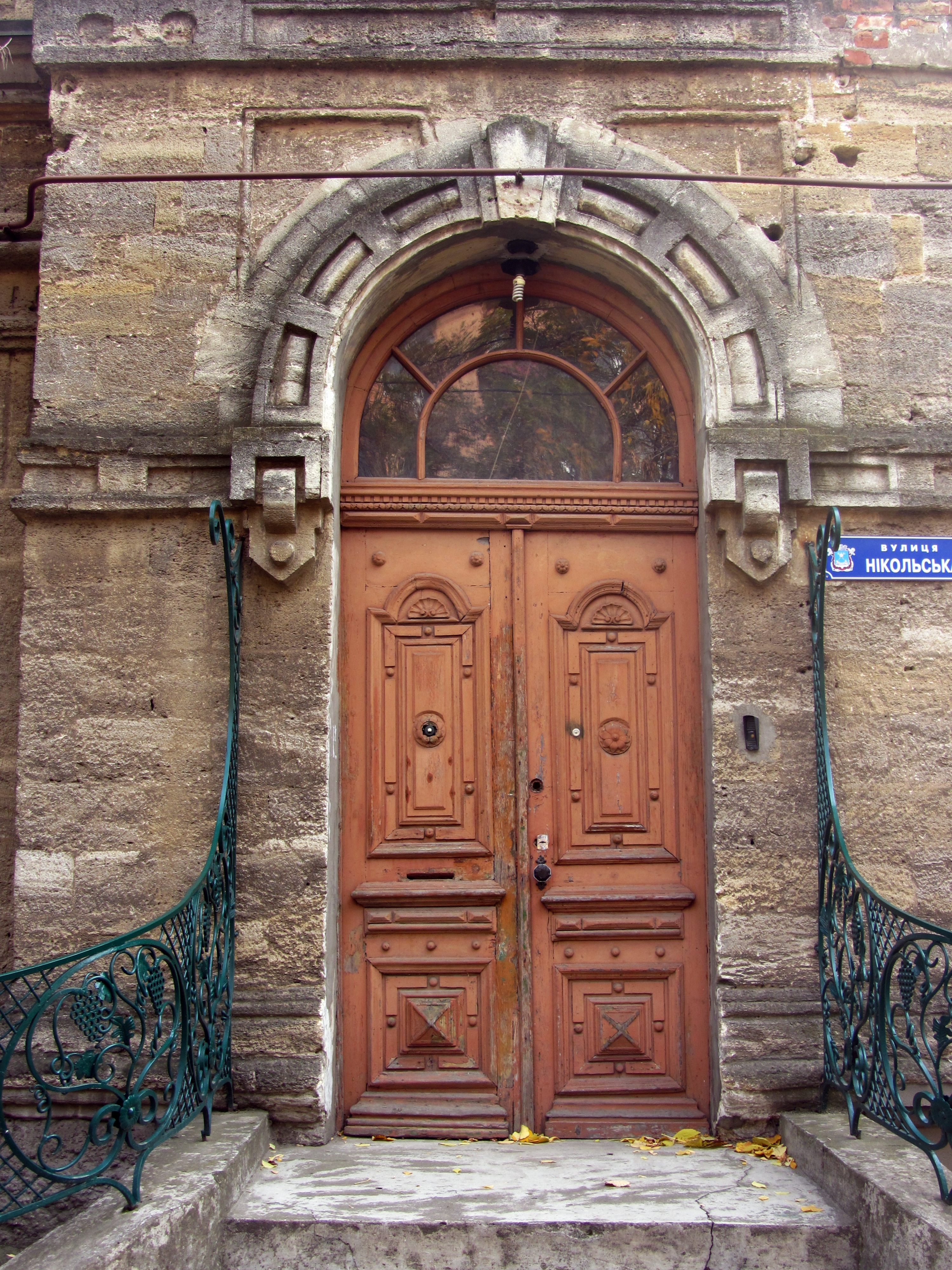 Житловий будинок-особняк, Миколаїв, вул. Нікольська, 1